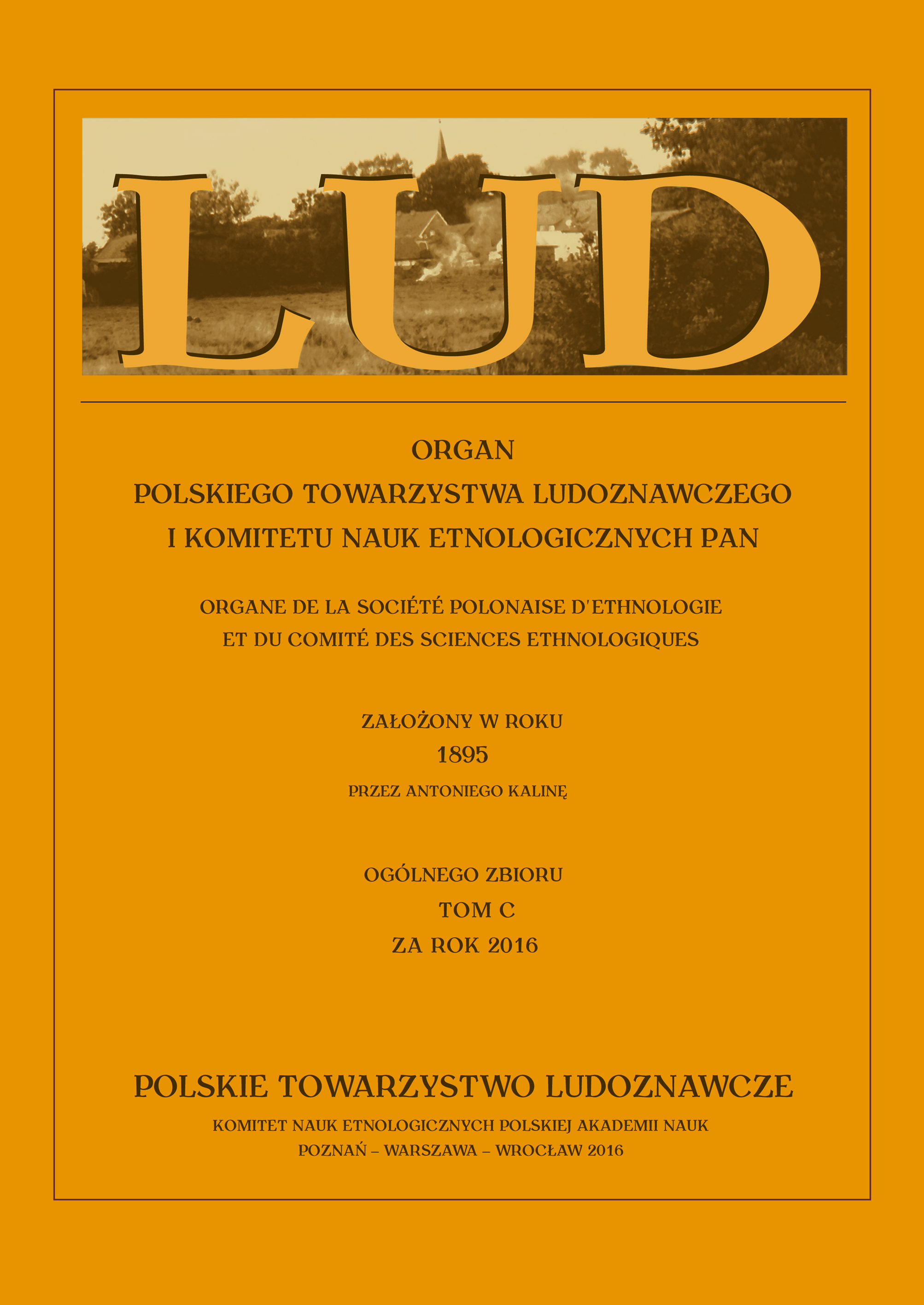 Okładka setnego tomu czasopisma naukowego LUD, wydanego w Poznaniu w 2016 roku